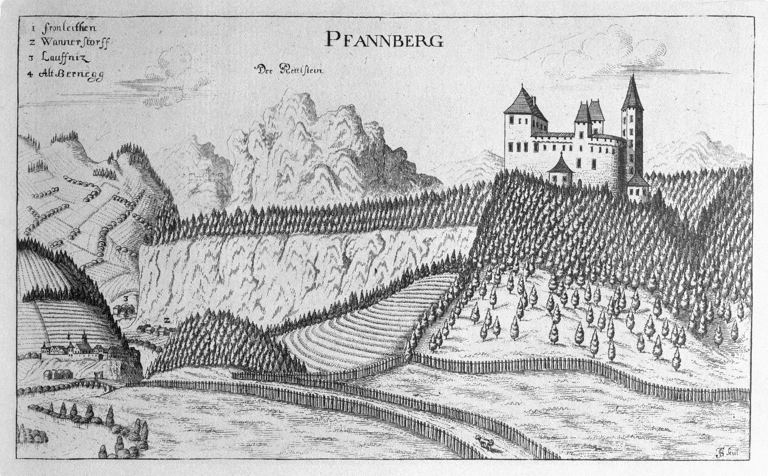 G. M. Vischers Käyserlichen Geographi, Topographia Ducatus Stiriae, Das ist: Eigentliche Delineation / und Abbildung aller Städte / Schlösser / Marcktfleck / Lustgärten / Probsteyen / Stiffter / Clöster und Kirchen / so es sich im Herzogthumb Steyrmarck befinden; Und anjetzo Umb einen billichen Preyß zu finden seynd Bey Johann Bitsch Universitäts Buchhandlern / Auff dem Juden=Platz bey der guldenen Saulen. Graz 1681 Die Nummerierung der Dateien folgt der alphabetischen Reihung der Ortsnamen und entspricht nicht dem Vischer-Register